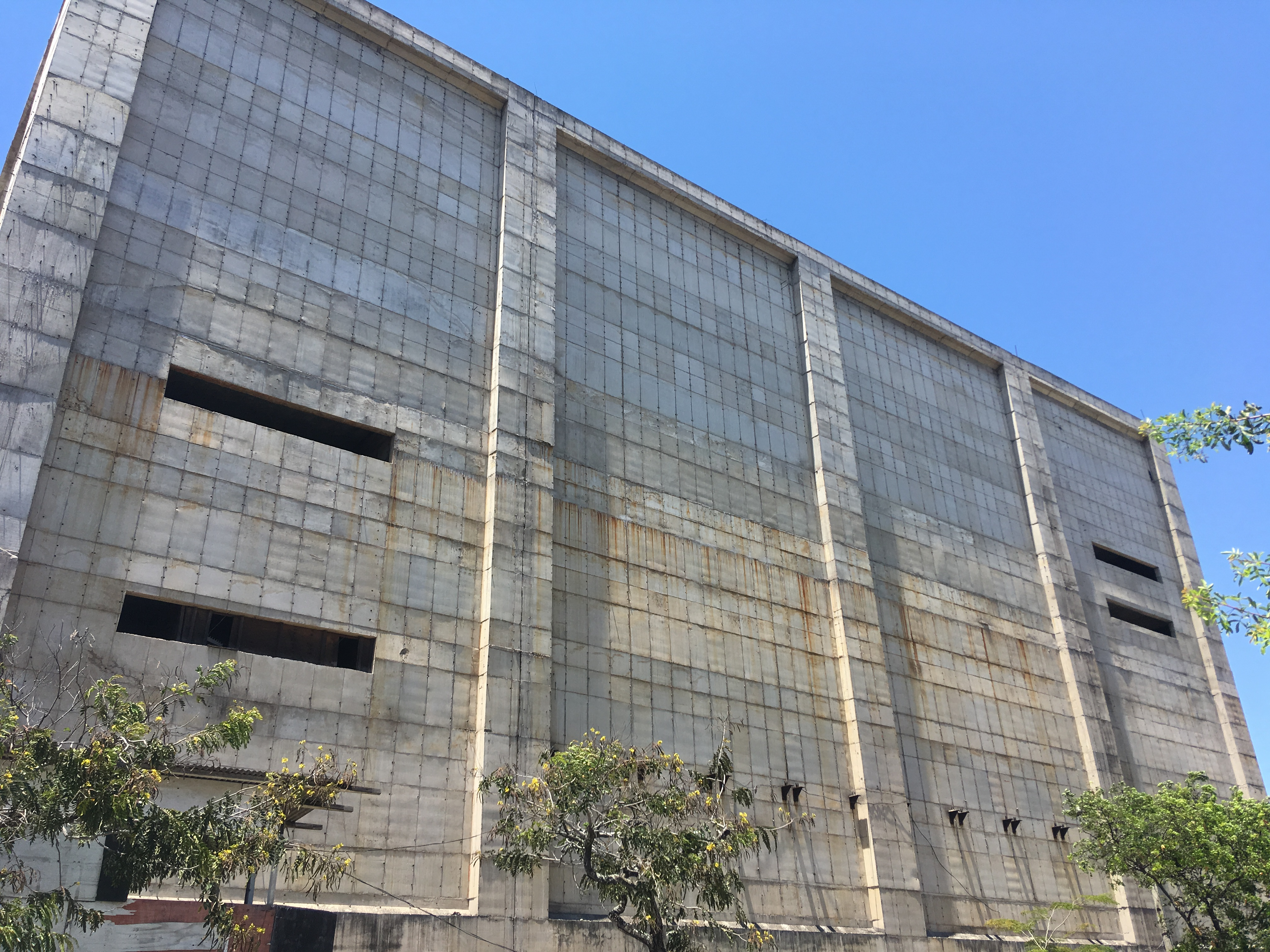 Parede manchada pela oxidação do aço estrutural.